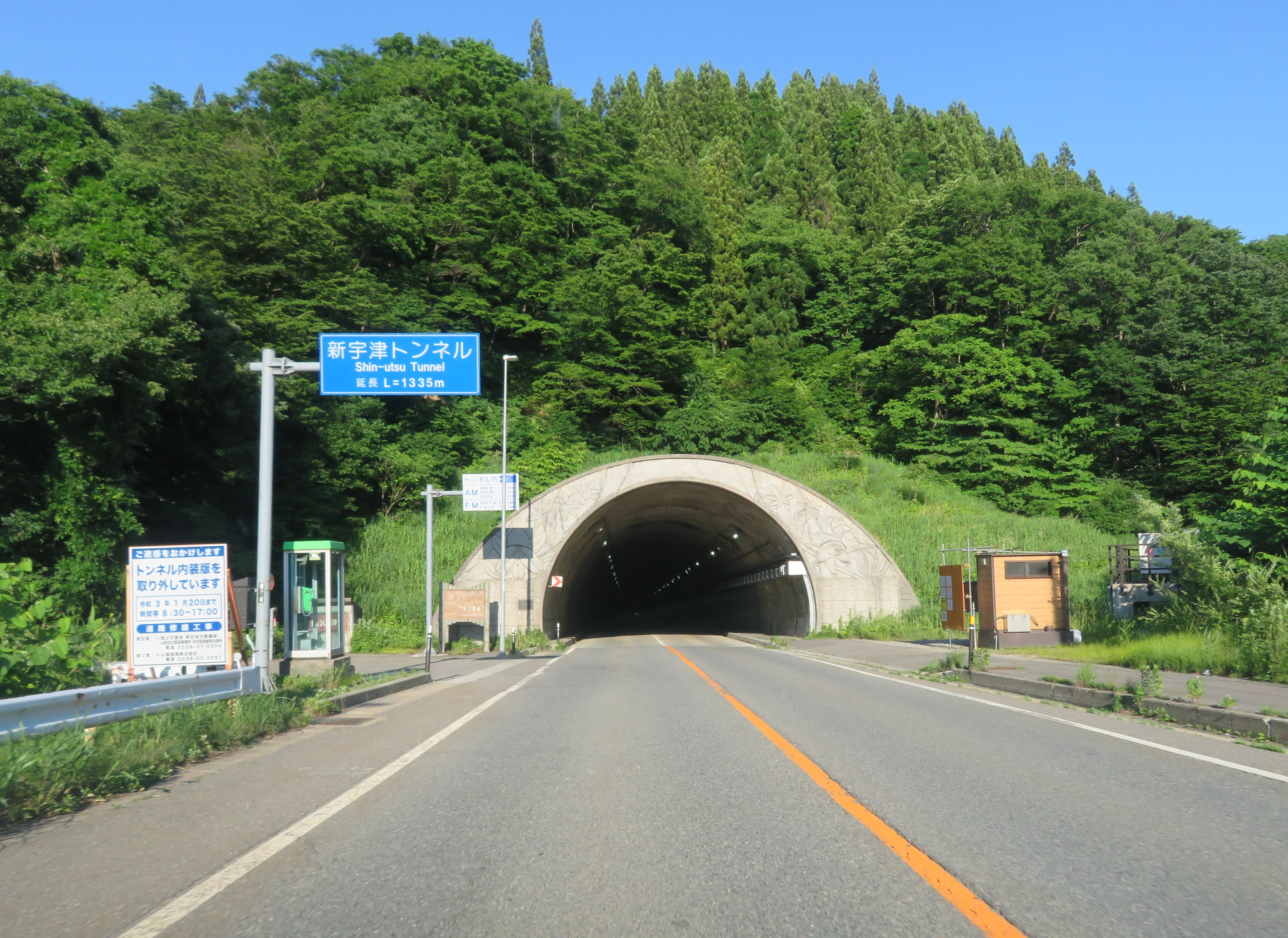 国道113号線 山形県西置賜郡小国町新宇津トンネル（新潟方面側坑口を撮影） Canon PowerShot SX720 HS